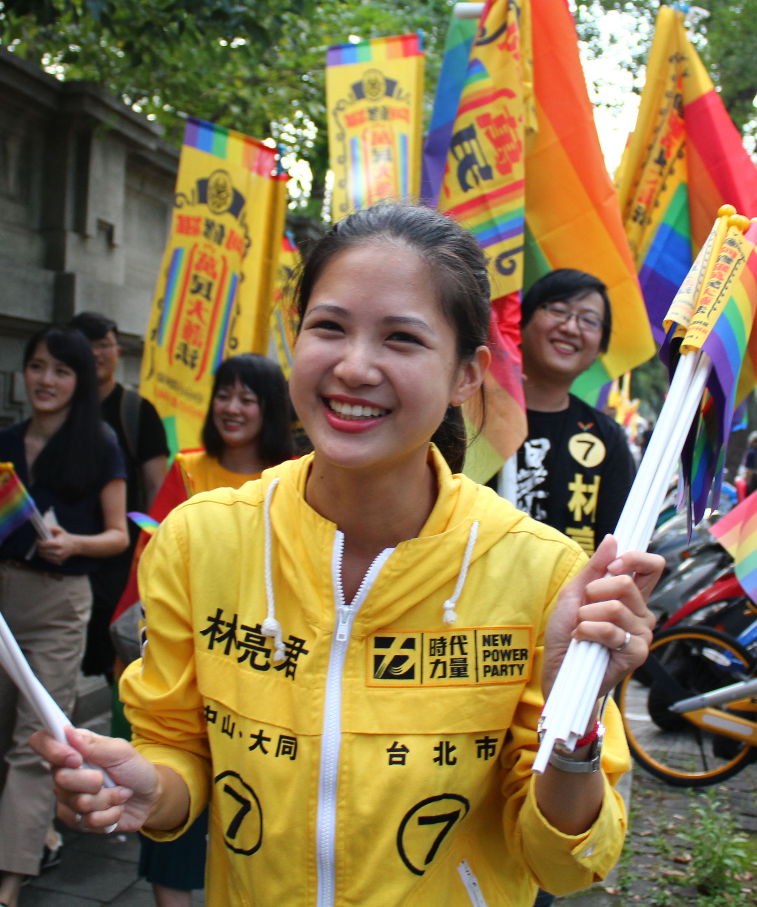 中文（台灣）: 林亮君於參選時期參加婚姻平權音樂會